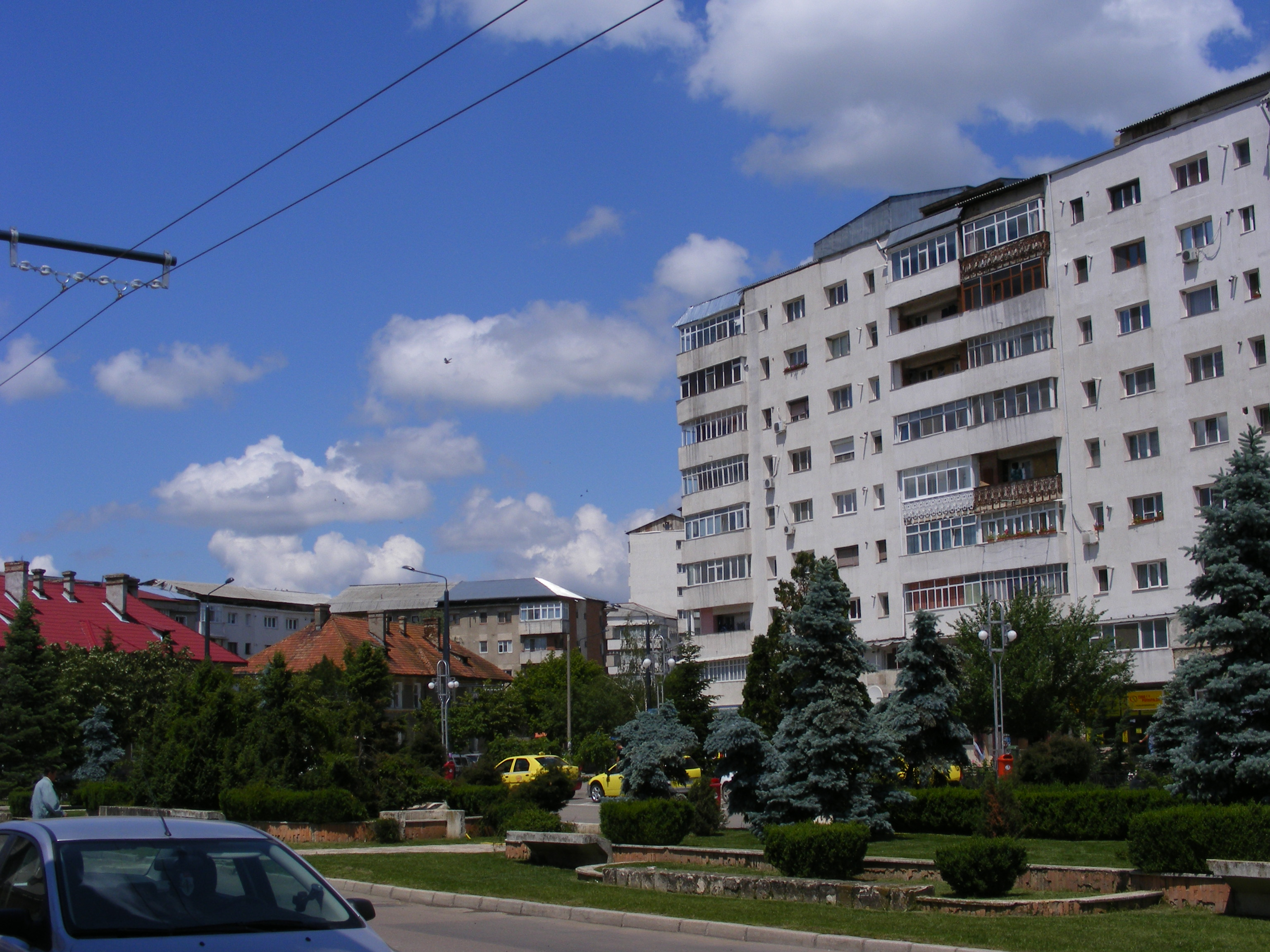 blocuri din zona garii